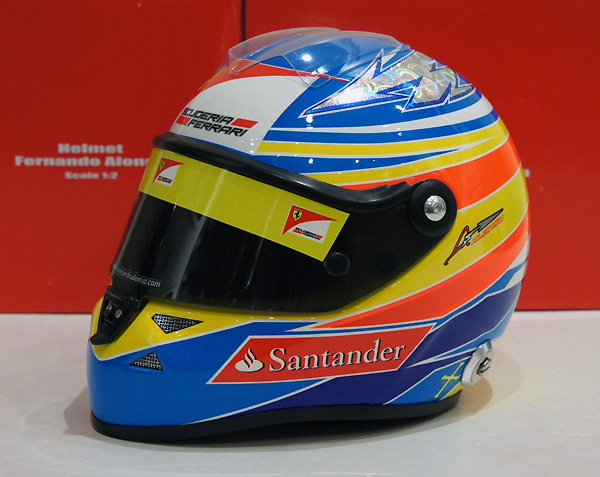 Helm Fernando Alonso di musim 2011. Ini adalah foto helm replika helm ukuran 1:2 produksi asli Schuberth milik saya.